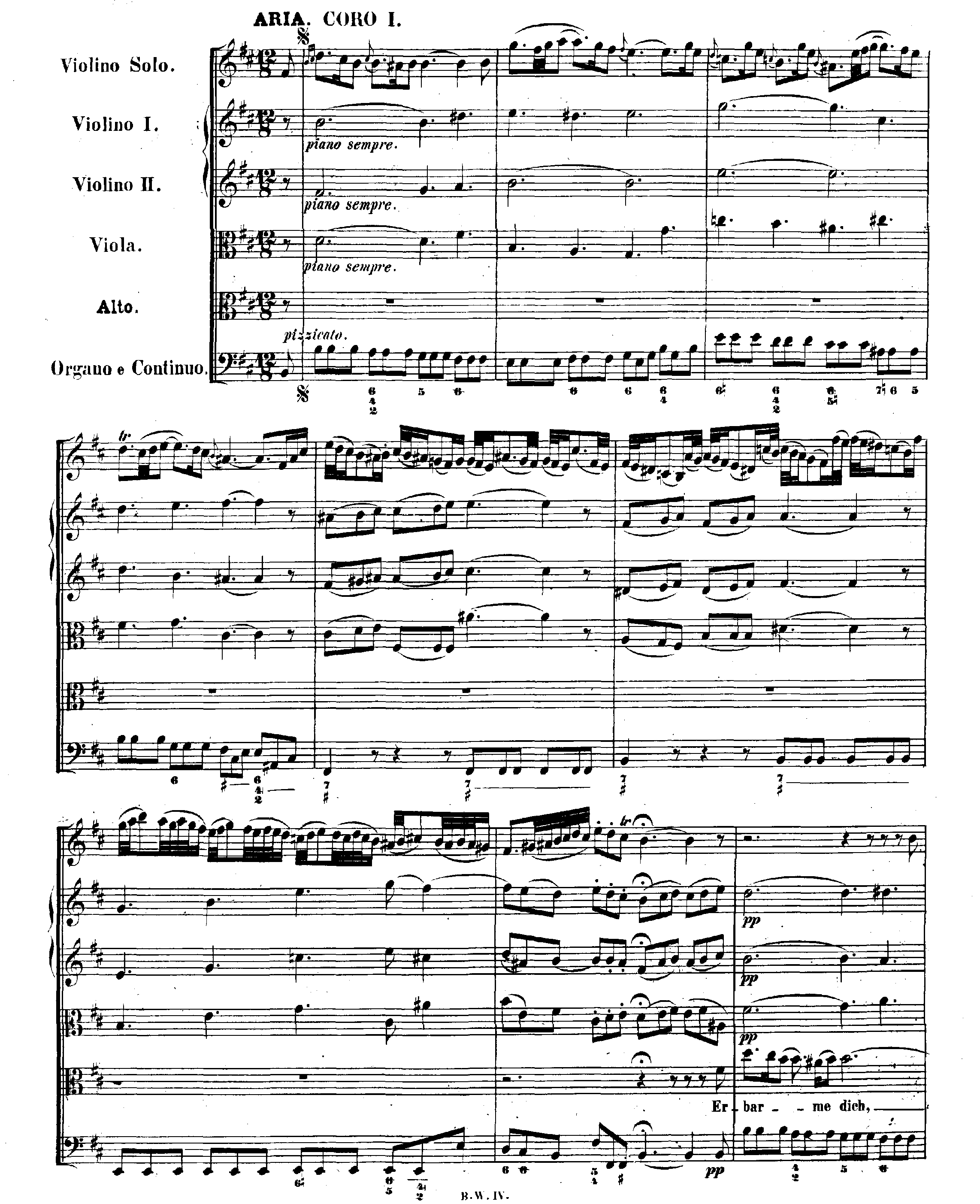 Хорал "Erbarme dich" (Бах. Страсти по Матфею. Начало)